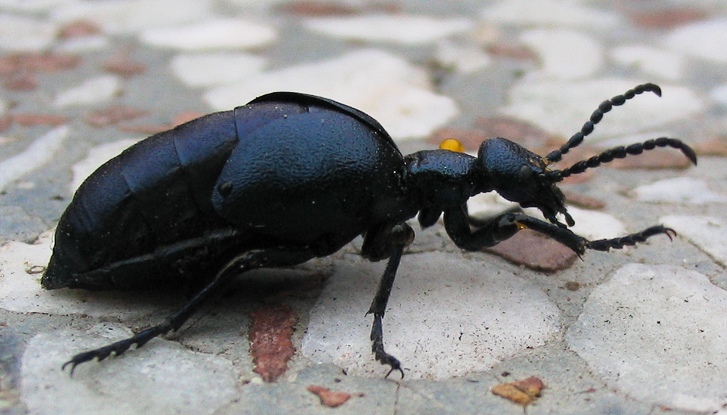 Beschreibung: Ölkäfer (Meloe violaceus) Fotograf: Darkone, 30. April 2005